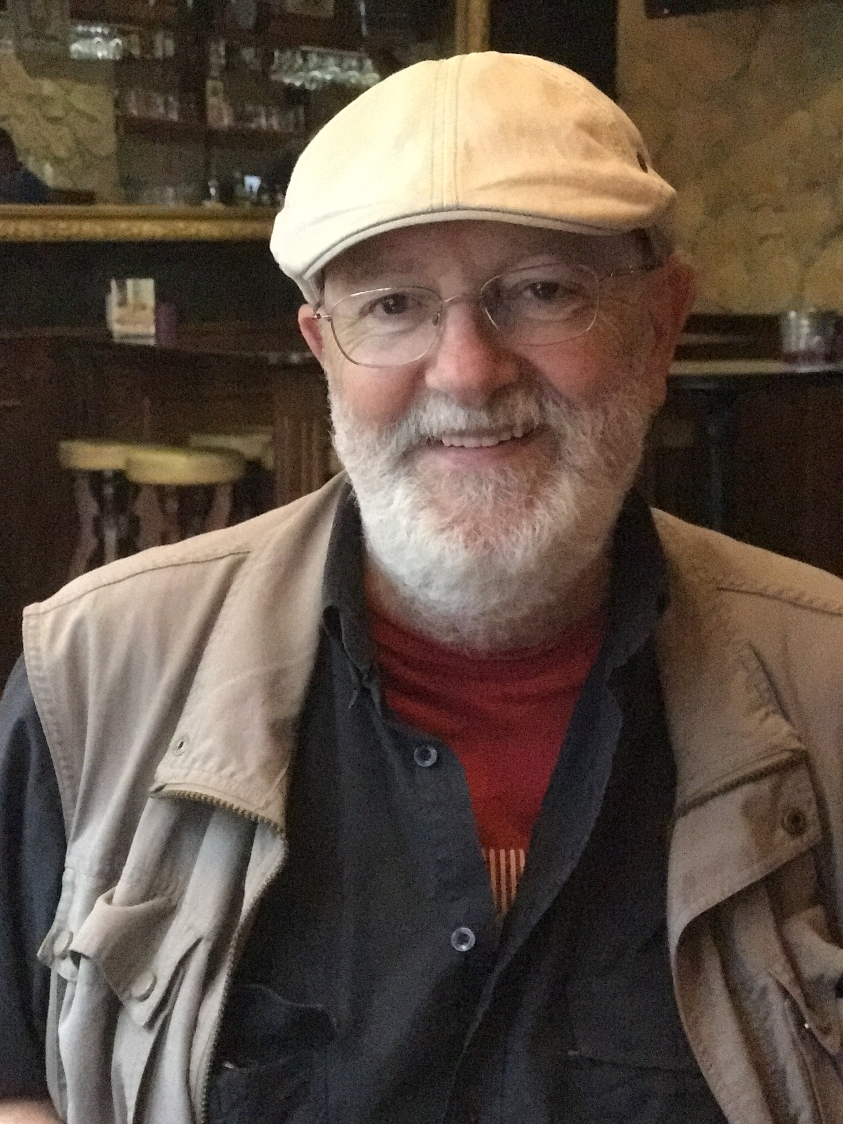 Foto de Jerónimo Granda en Gijón, 2017.